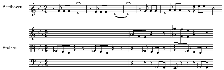 GNU-FDL, selbst erstellt